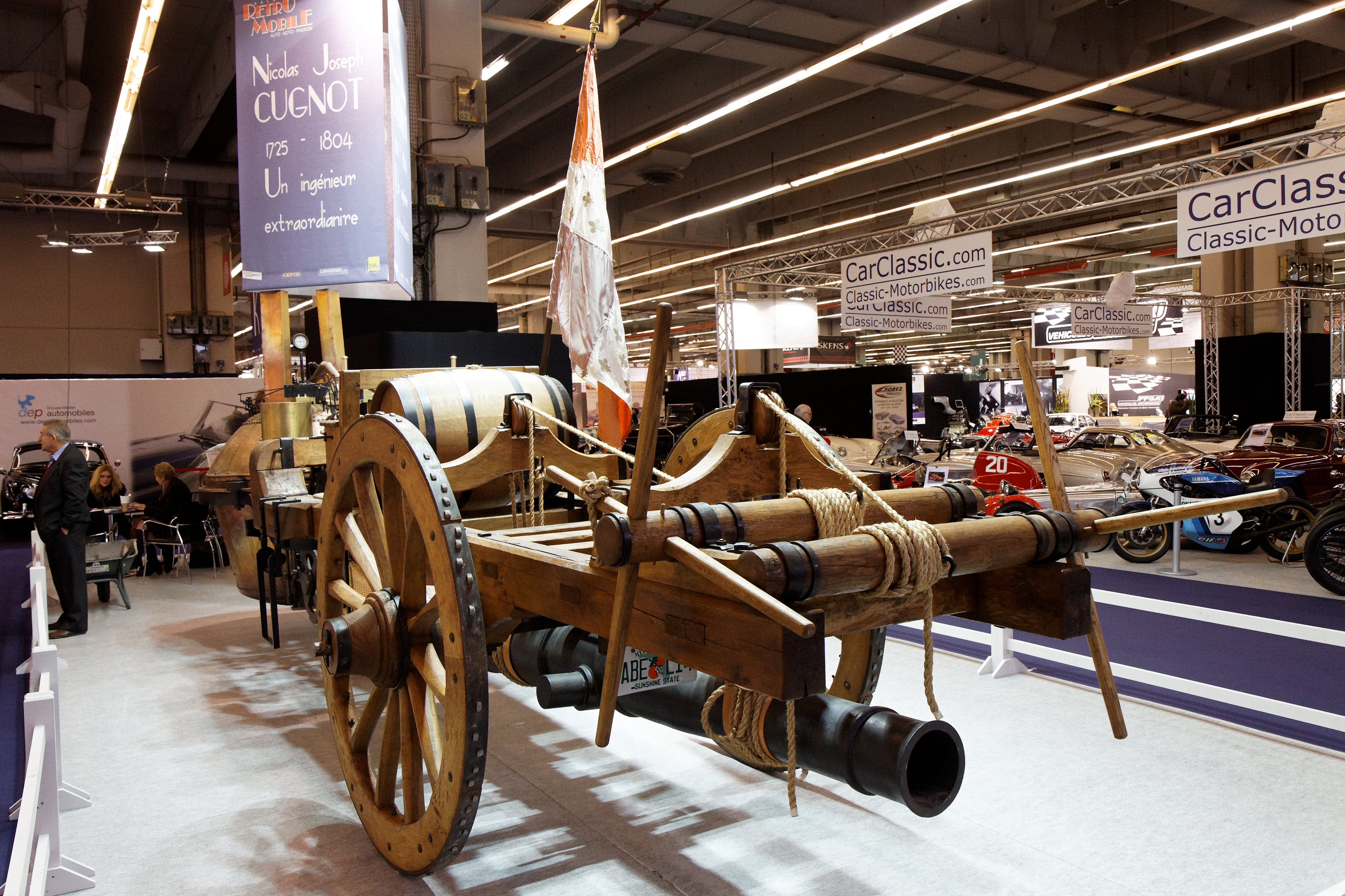 Photographie prise lors du salon rétromobile 2011 à Paris, porte de Versailles.